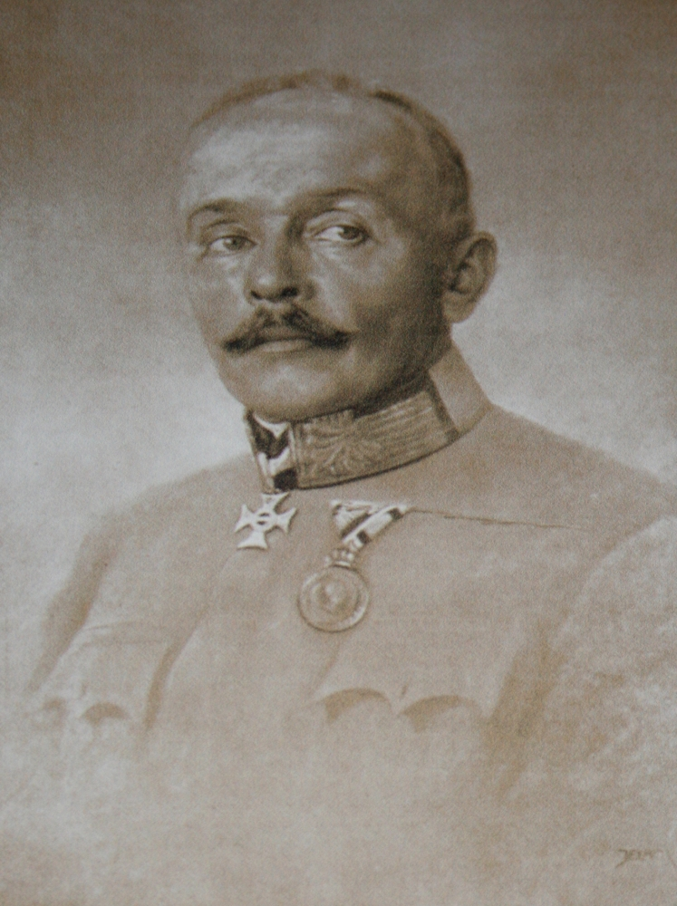 snimljeno tijekom Noći muzeja u Hrvatskom državnom Arhivu u Zagrebu